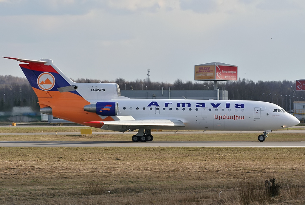 Armavia Yakovlev Yak-42D